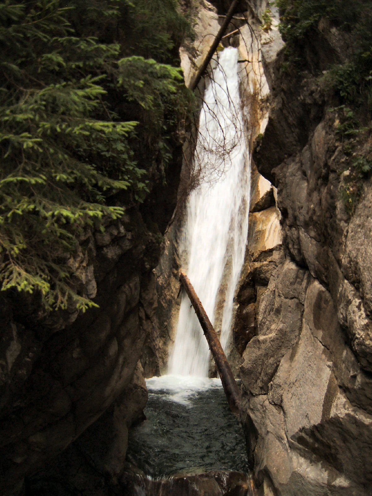 Wasserfall am Tatzlwurm.